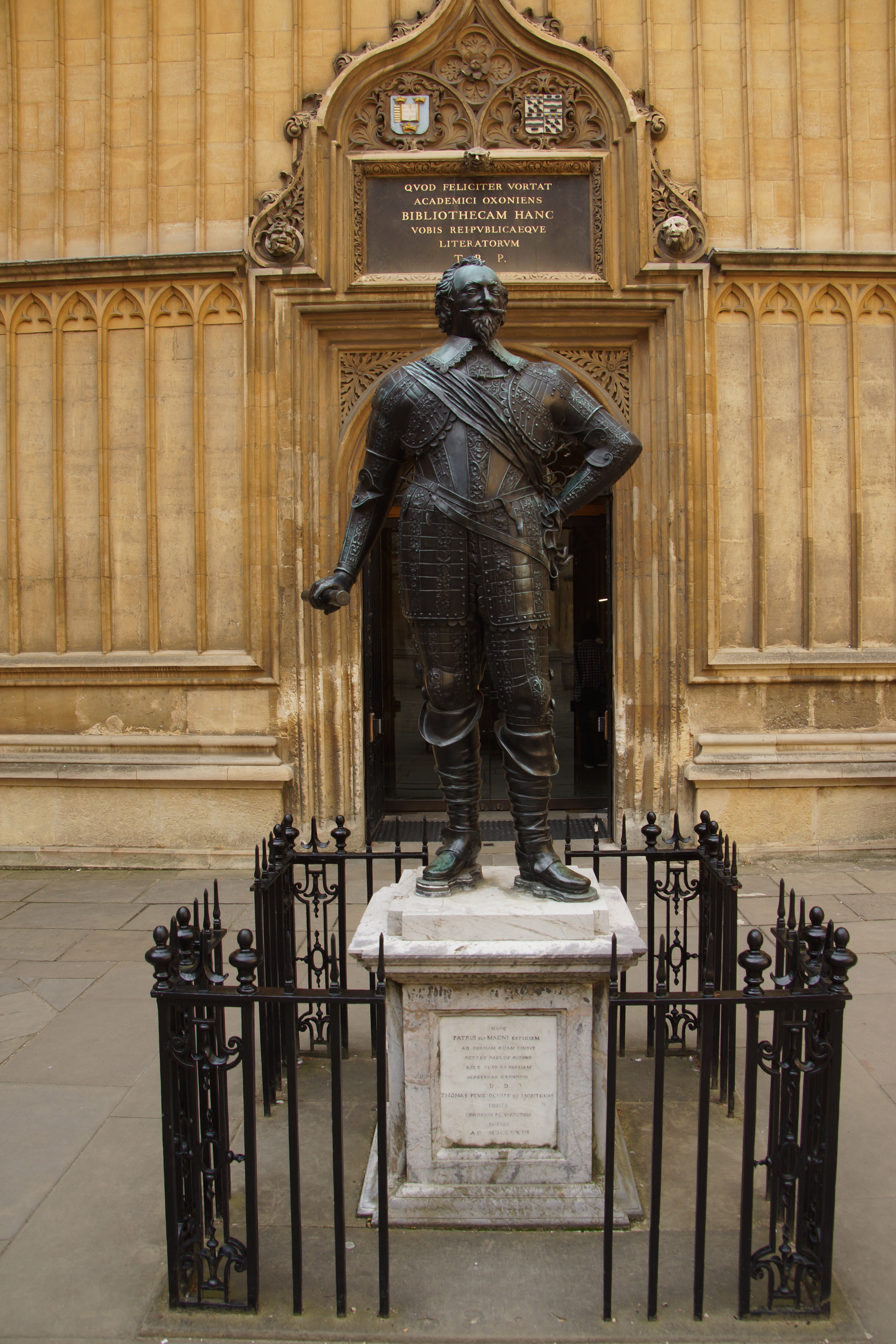 Statue von William Herbert, 3rd Earl of Pembroke, Bodleian Library, Oxford